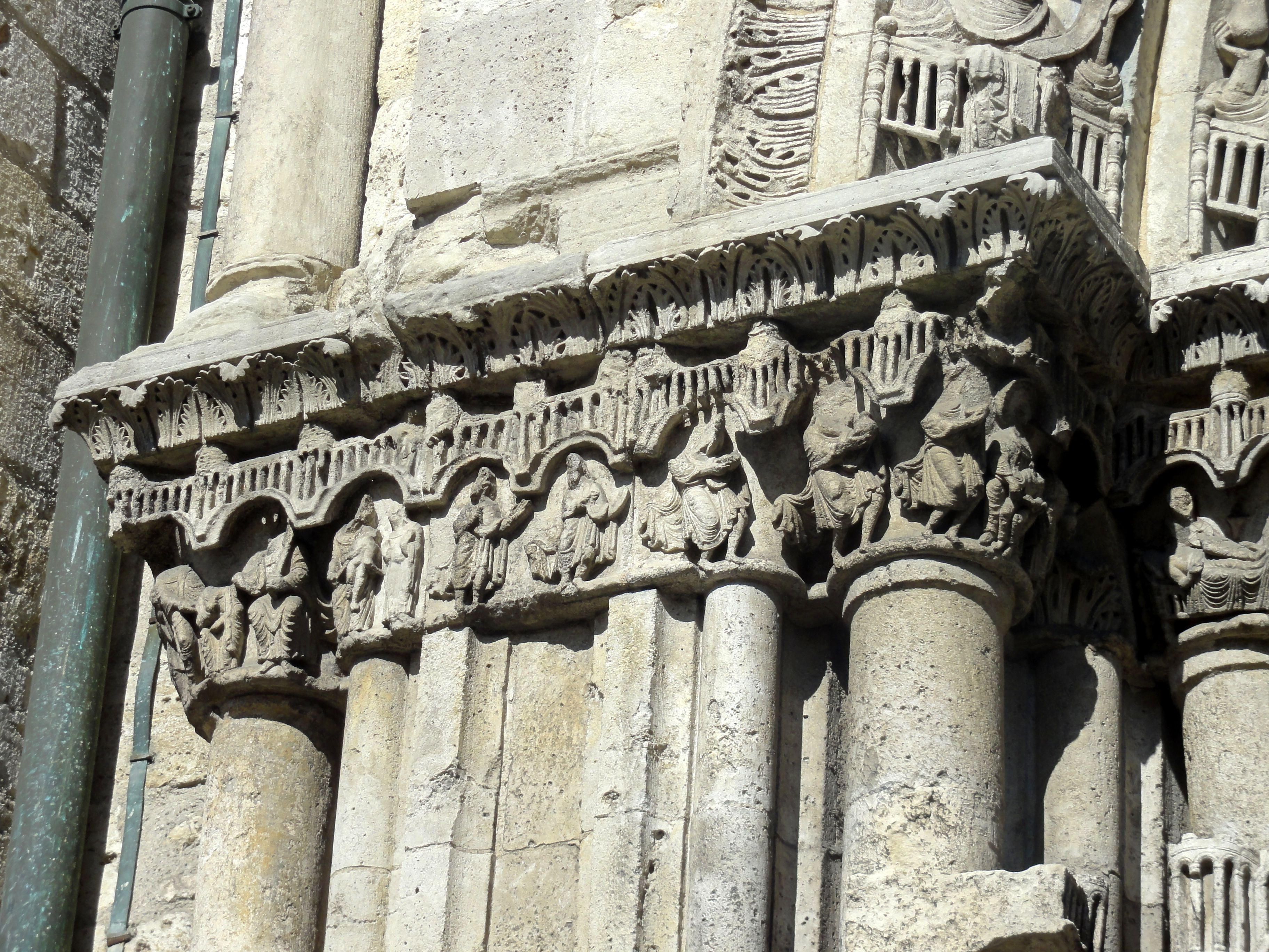 Portail méridional, détail.